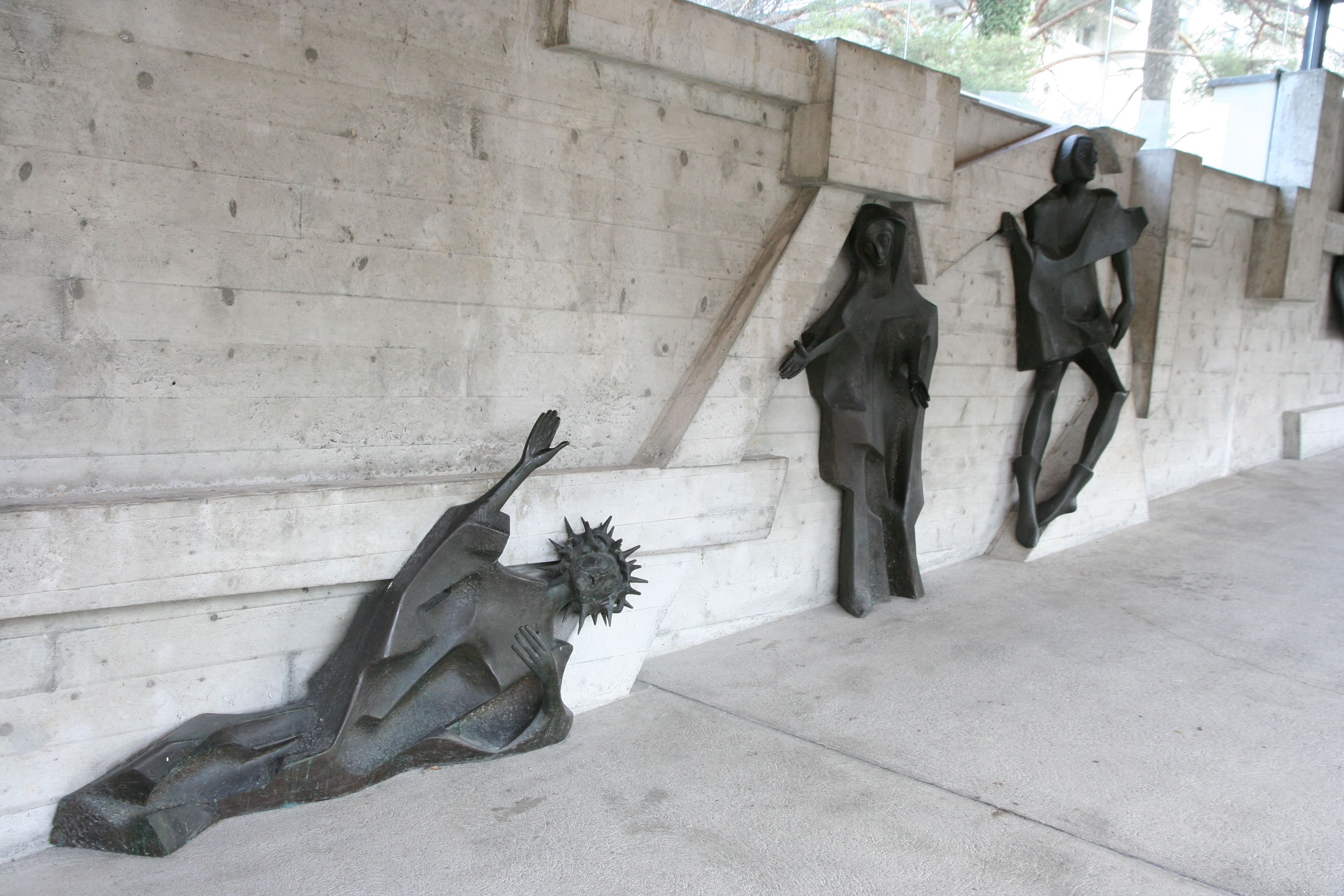 Kreuweg mit Bronzeplastiken (Albert Wider 1964/1965) der Römisch-katholische Pfarrkirche Herz Jesu in Buchs SG, erbaut von Justus Dahinden